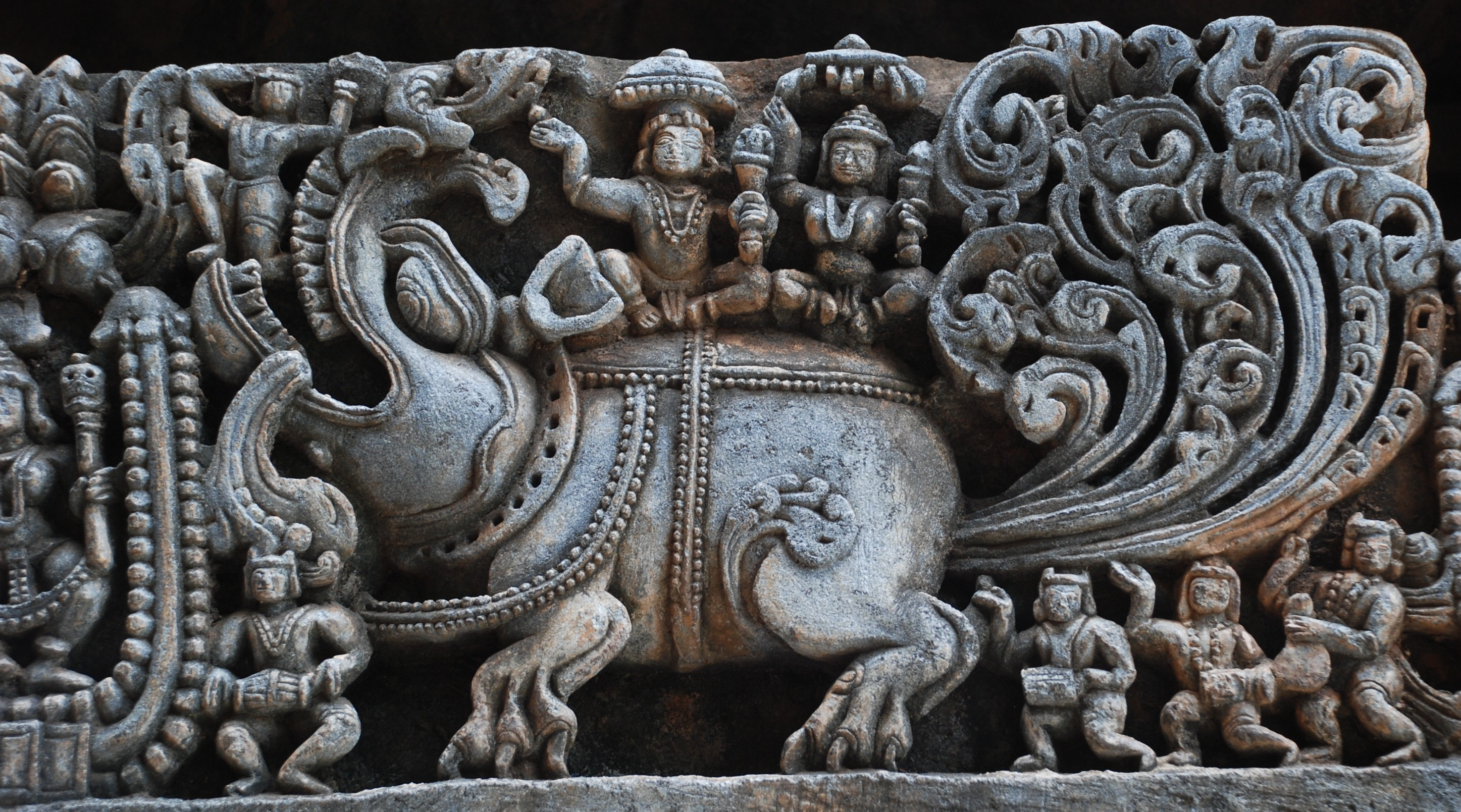 ಕನ್ನಡ: ಮಕರ ಪ್ರಾಣಿ